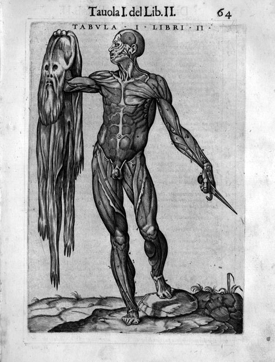 Juan de Valverde (ca. 1525-ca. 1587): La anatomia del corpo umano, 1586.